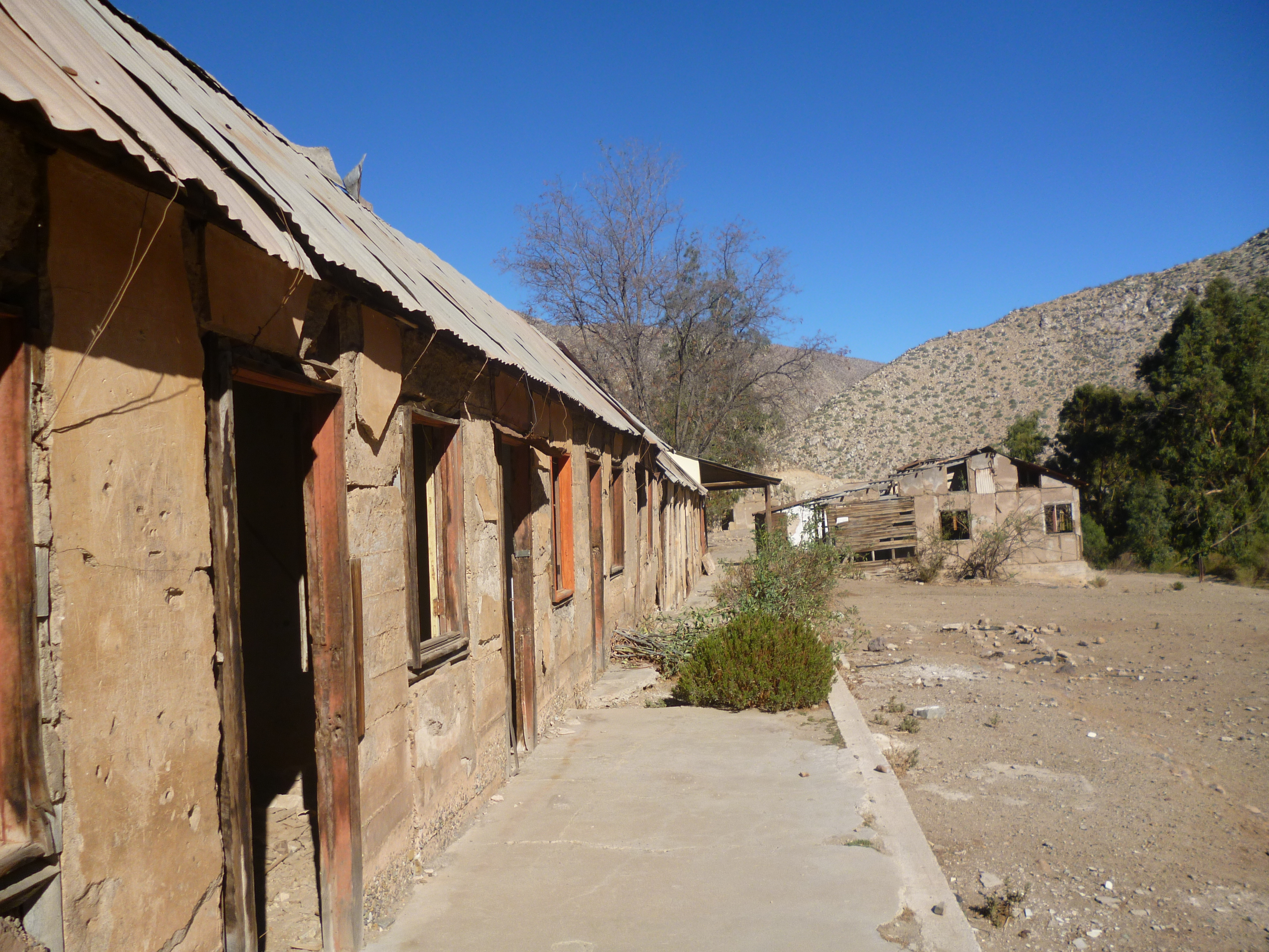 Antiguas construcciones.